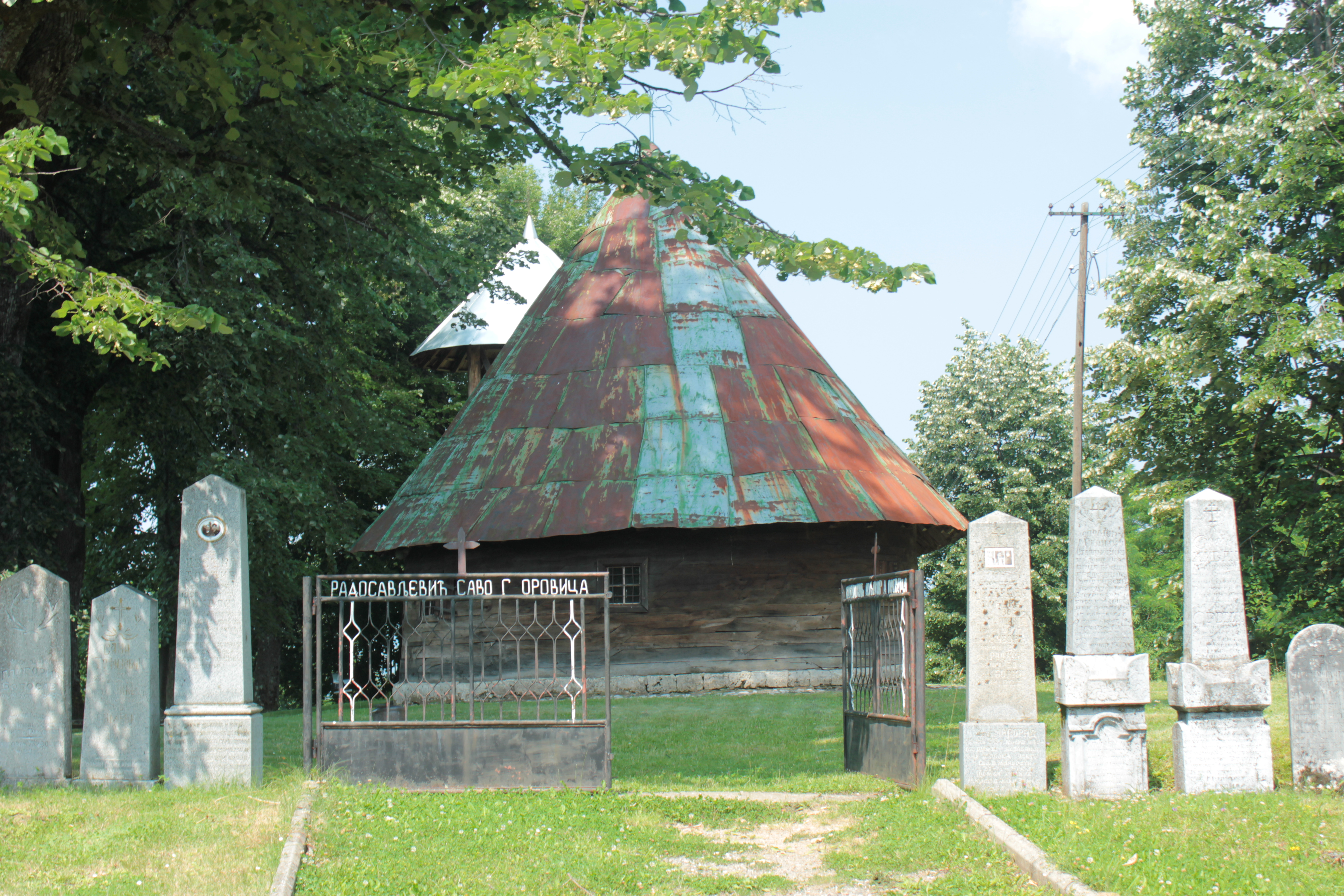 Црква брвнара у Доњој Оровици